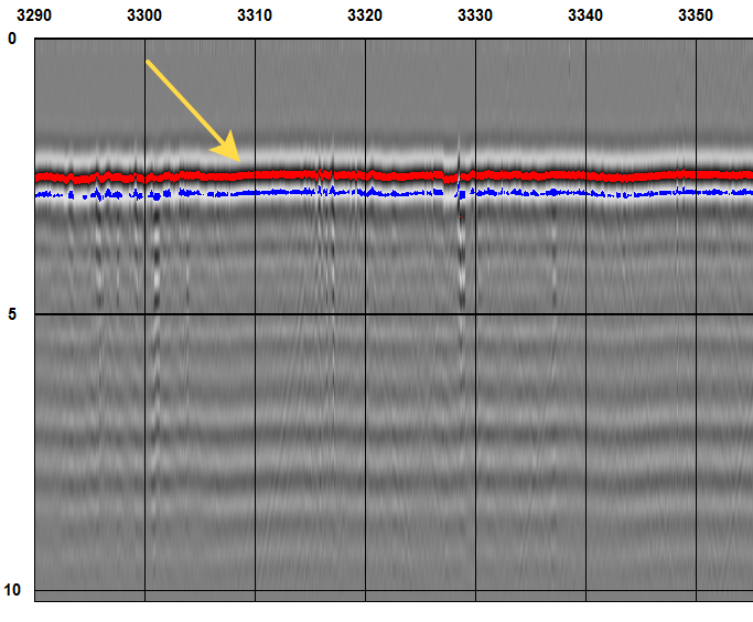 Запись акустического каротажа